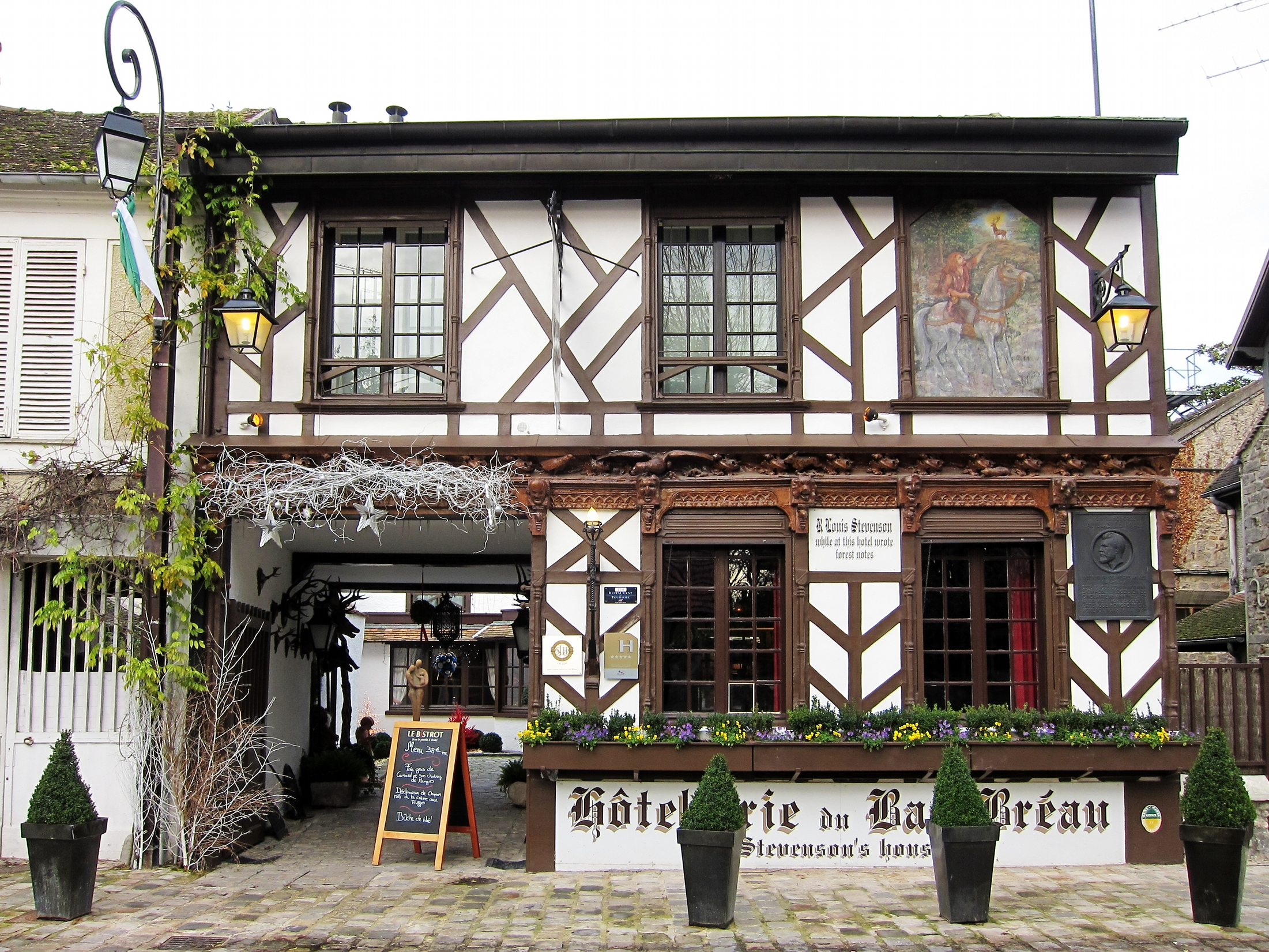 L'Hôtellerie du Bas-Bréau à Barbizon.